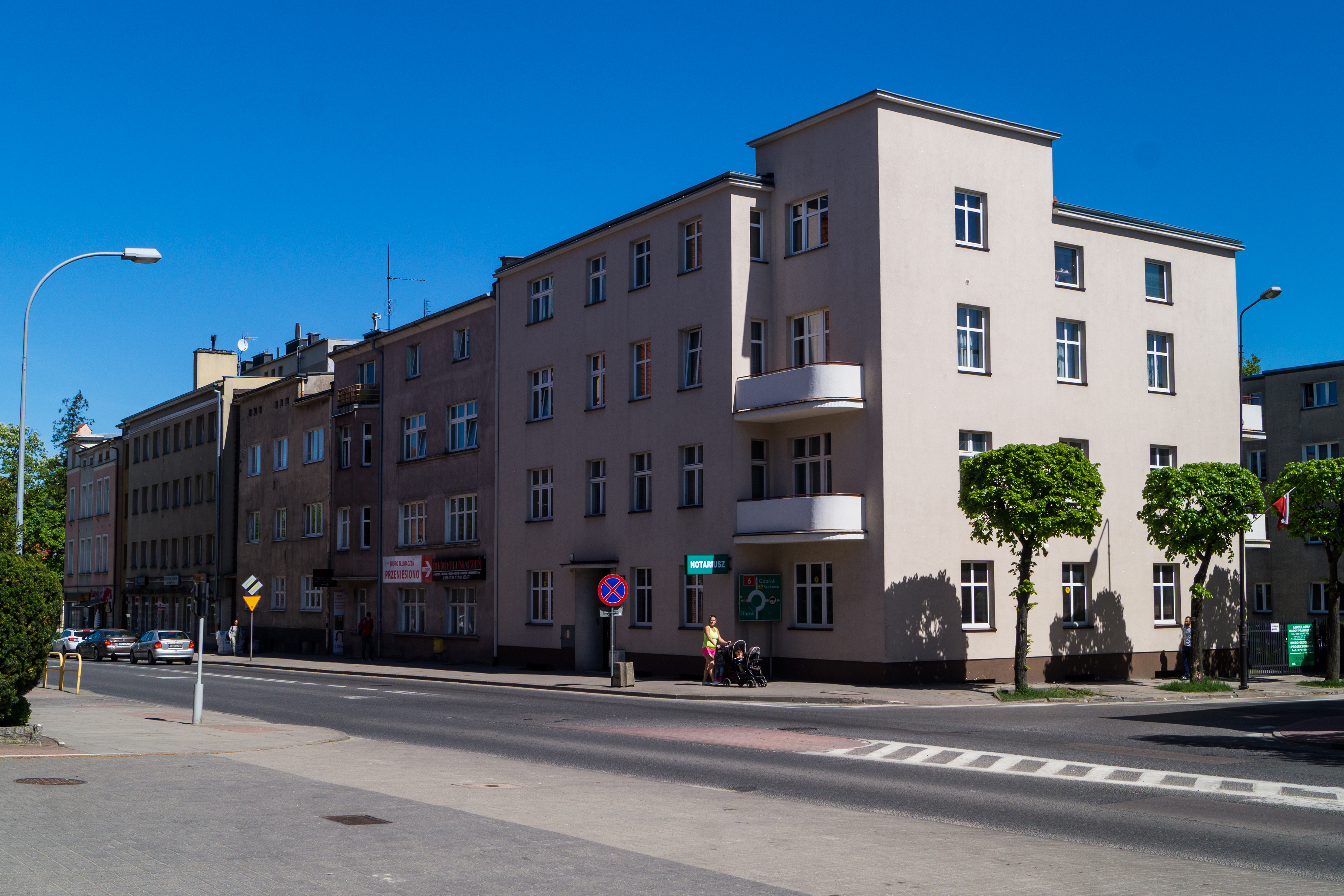 Budynek na rogu ulic 3 maja i Kościuszki pokazujący typowy przykład architektury modernizmu w Wejherowie